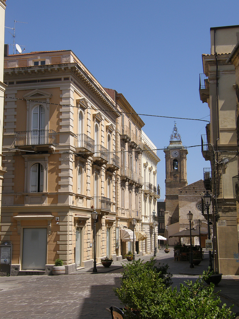 Vasto